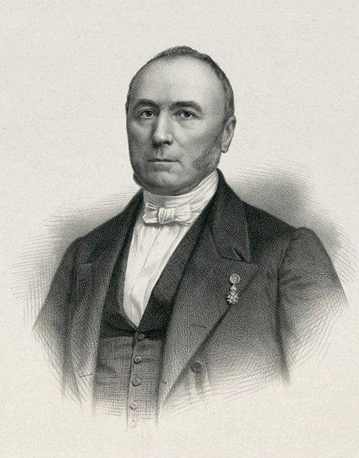 Portrait de Jules Gabriel Aymé de Laherliere. Bibliothèque nationale de France, département Estampes et photographie